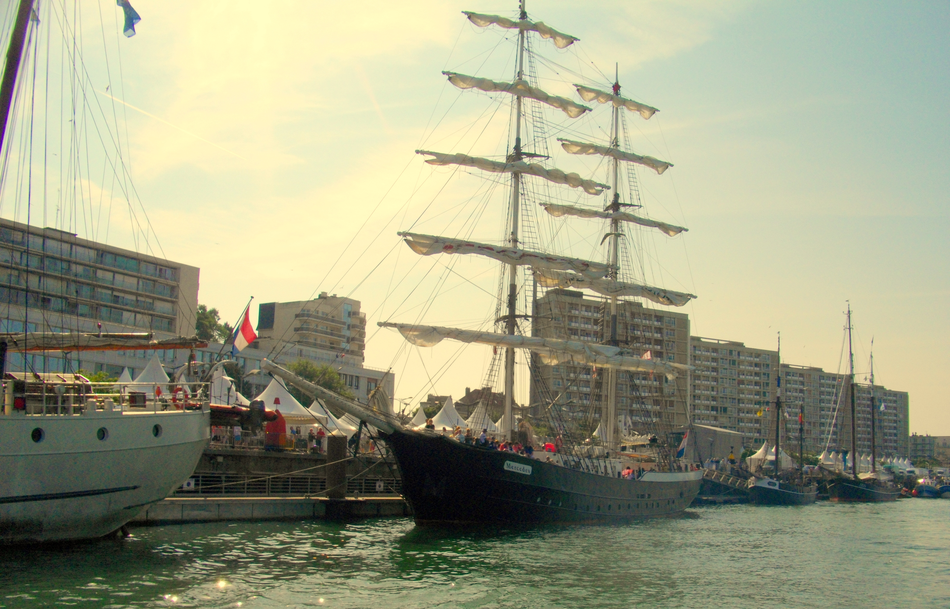 Quai Gambetta : les voiliers traditionnels pour les ballades en mer.